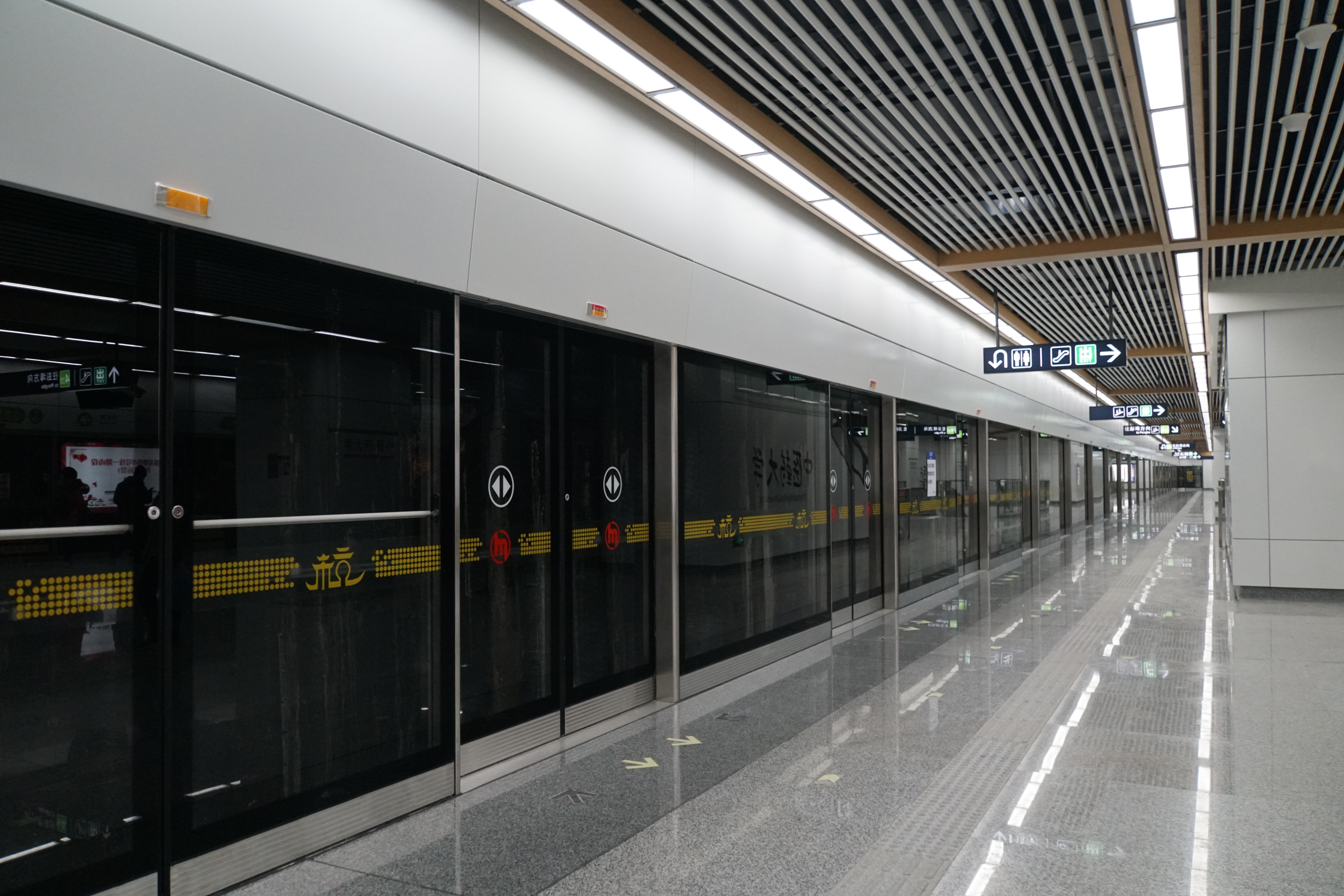 中医药大学站6号线预留站台